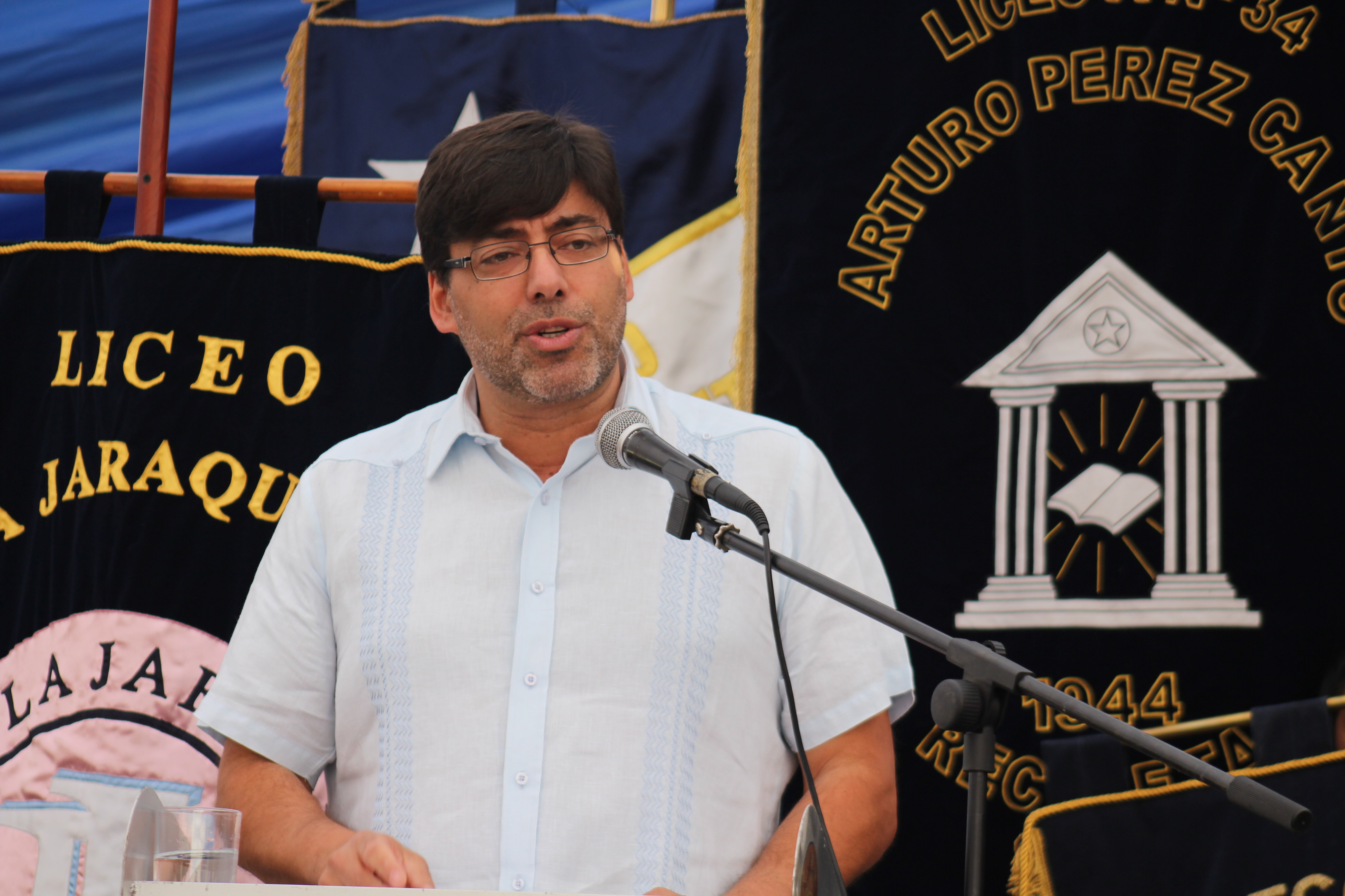 Inauguración de año escolar en Recoleta